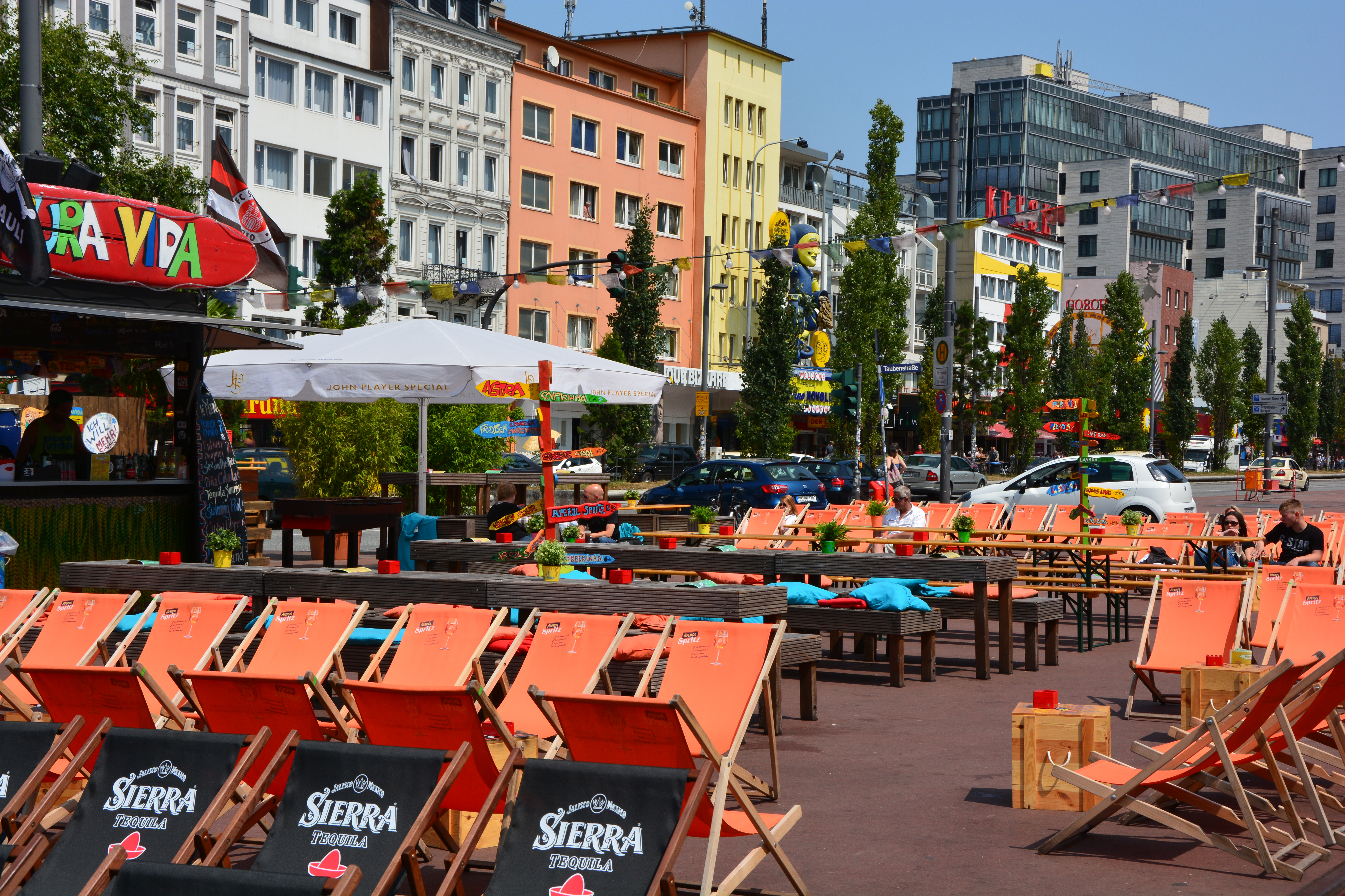 Die Veranstaltungsfläche "Spielbudenplatz" in Hamburg-St.Pauli